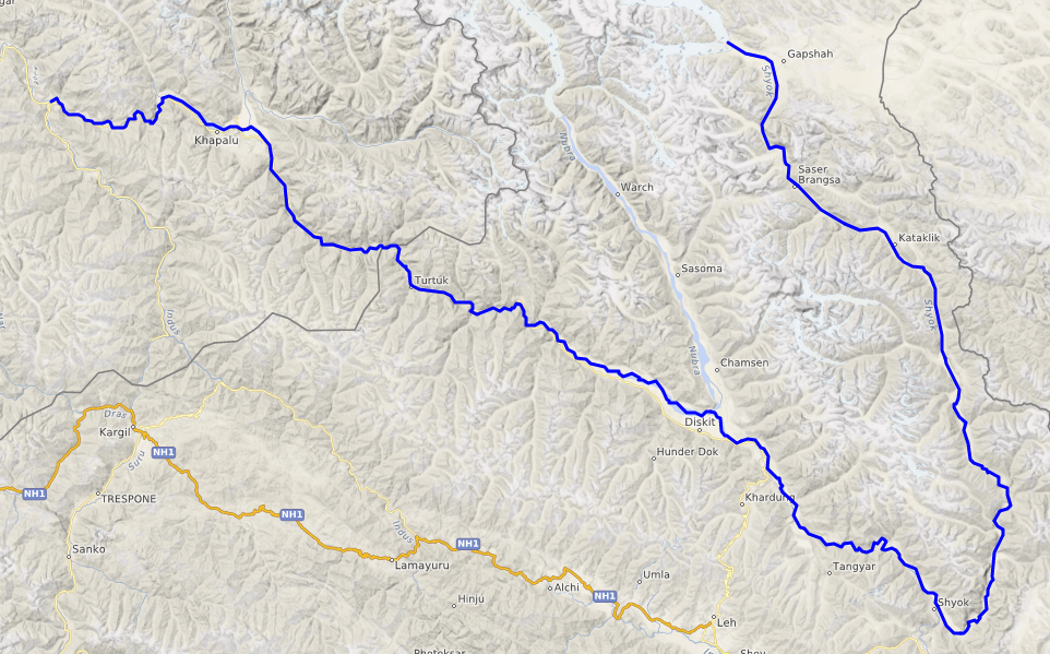 carte réalisée sur umap This map may be incomplete, and may contain errors. Don't rely solely on it for navigation.